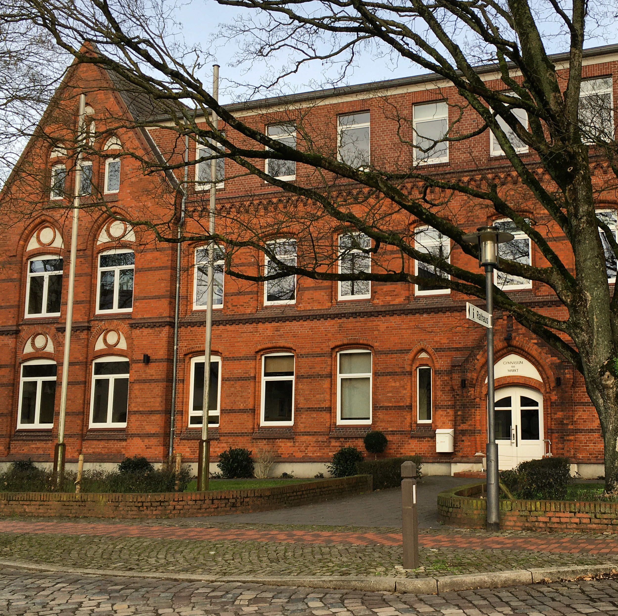 Deitsch: Frontansicht des Gymnasiums am Markt in Achim bei Bremen